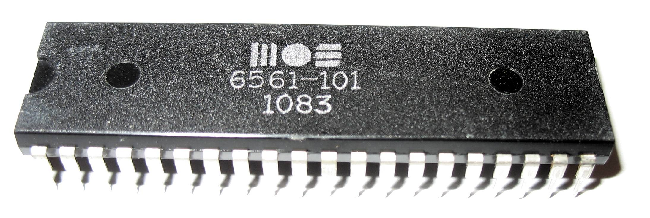 MOS 6561 VIC (Video Interface Chip), kärnan i VIC-20